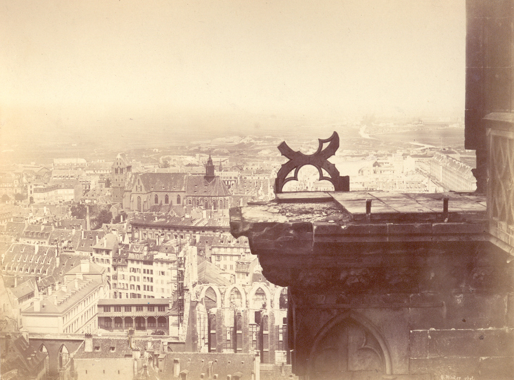 Charles-David Winter, Strasbourg, dégâts à la cathédrale après les bombardements de 1870, photographie sur papier albuminé, Musée d'art moderne et contemporain de Strasbourg.